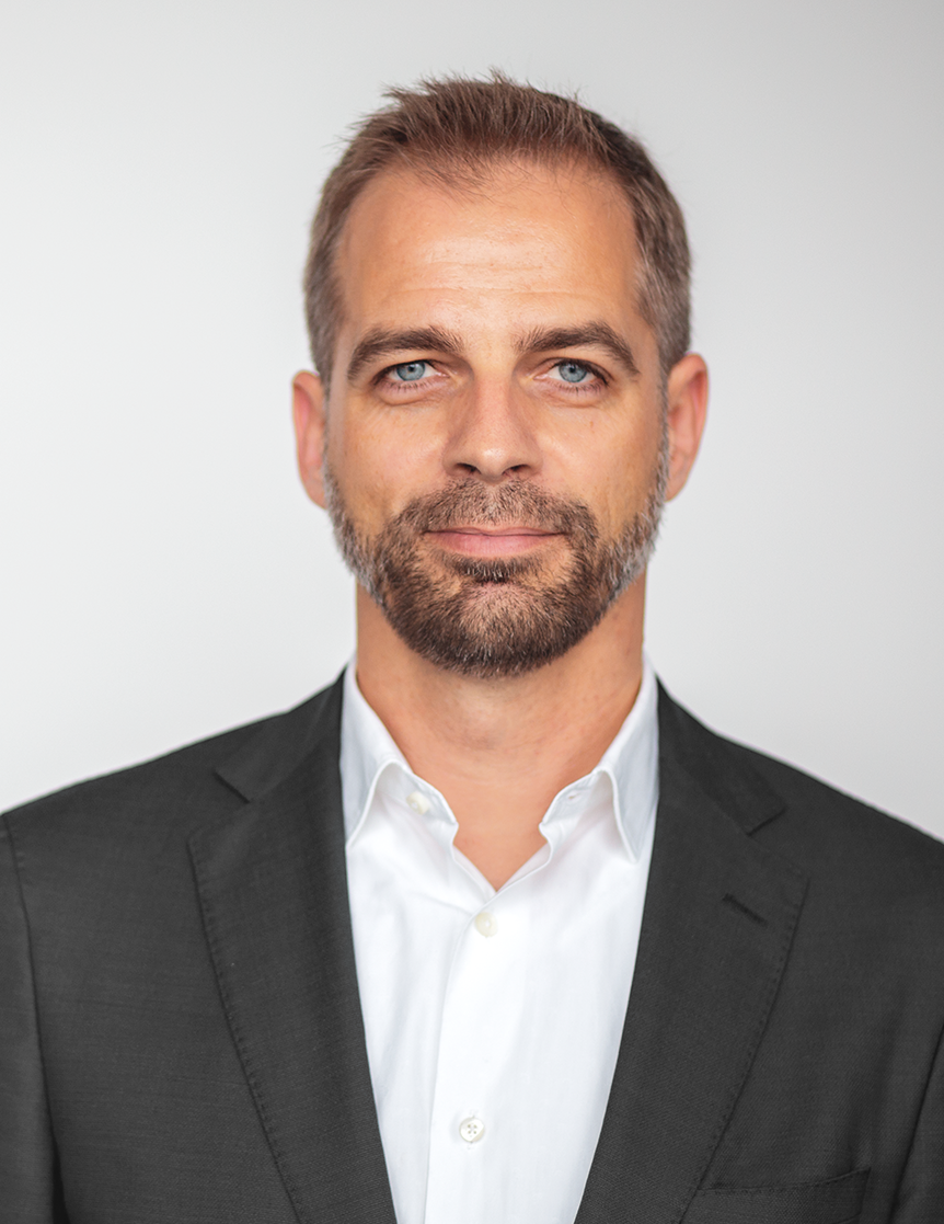 Stefan Liebich im Jahr 2017, Foto von Ben Gross